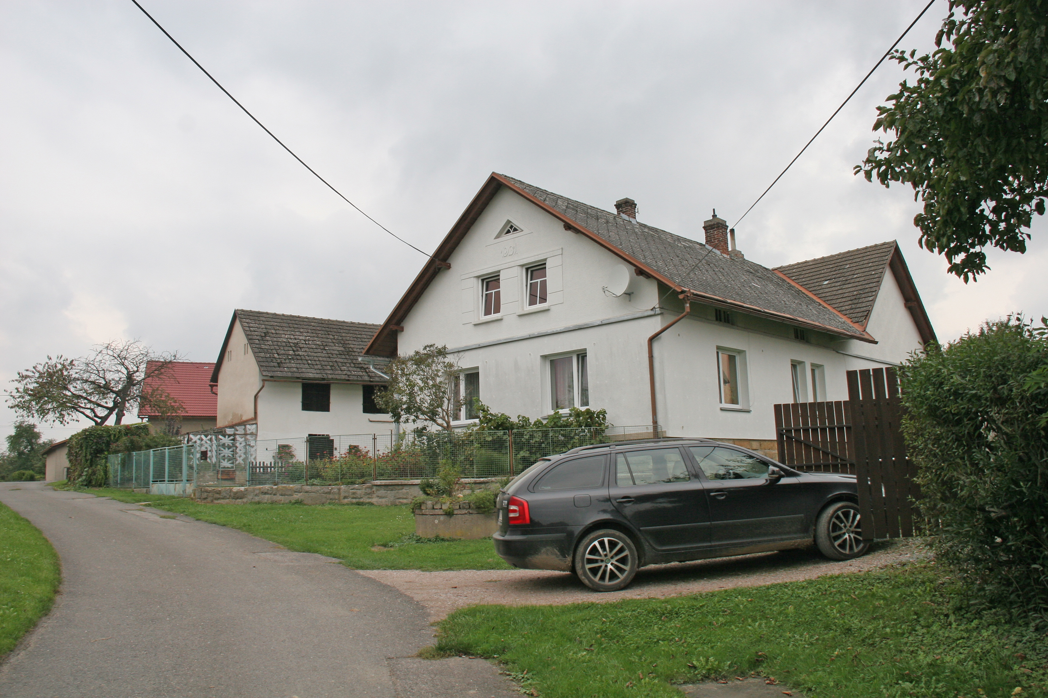 Střeziměřice čp. 2